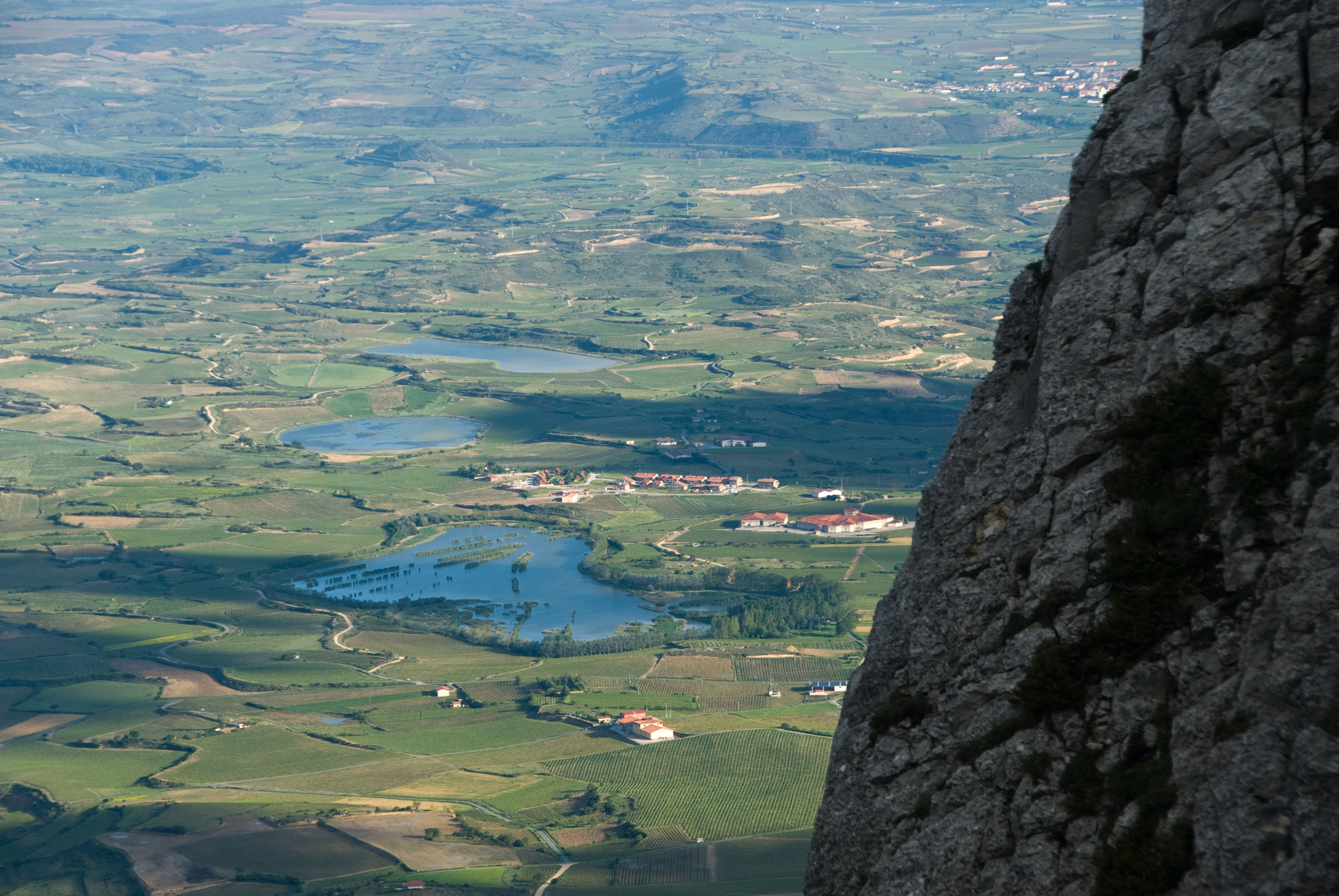 Lagunas de Laguardia desde la Sierra de Cantabria This is a photography of a Site of Community Importance in Spain with the ID: ES2110021. Natura2000 entry, EEA entry